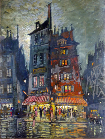 Париж